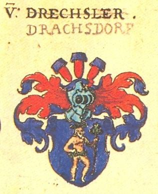 Coat of Arms, Drachsdorf Family, Meissen Saxony (from: Johann Siebmacher: New Wappenbuch, scan from: Horst Appuhn, Johann Siebmachers Wappenbuch. Die bibliophilen Taschenbücher 538, 2. verb. Aufl , Dortmund 1989 Meißner, Blatt 152)